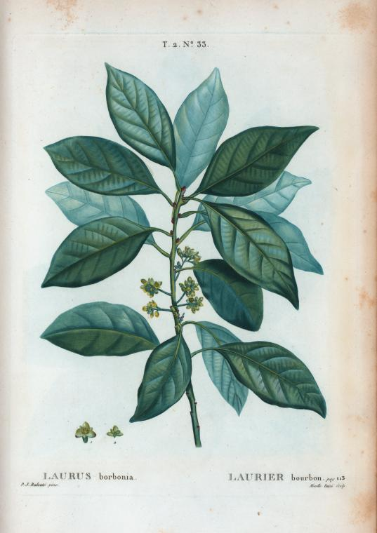 Laurus borbonia = Laurier bourbon.